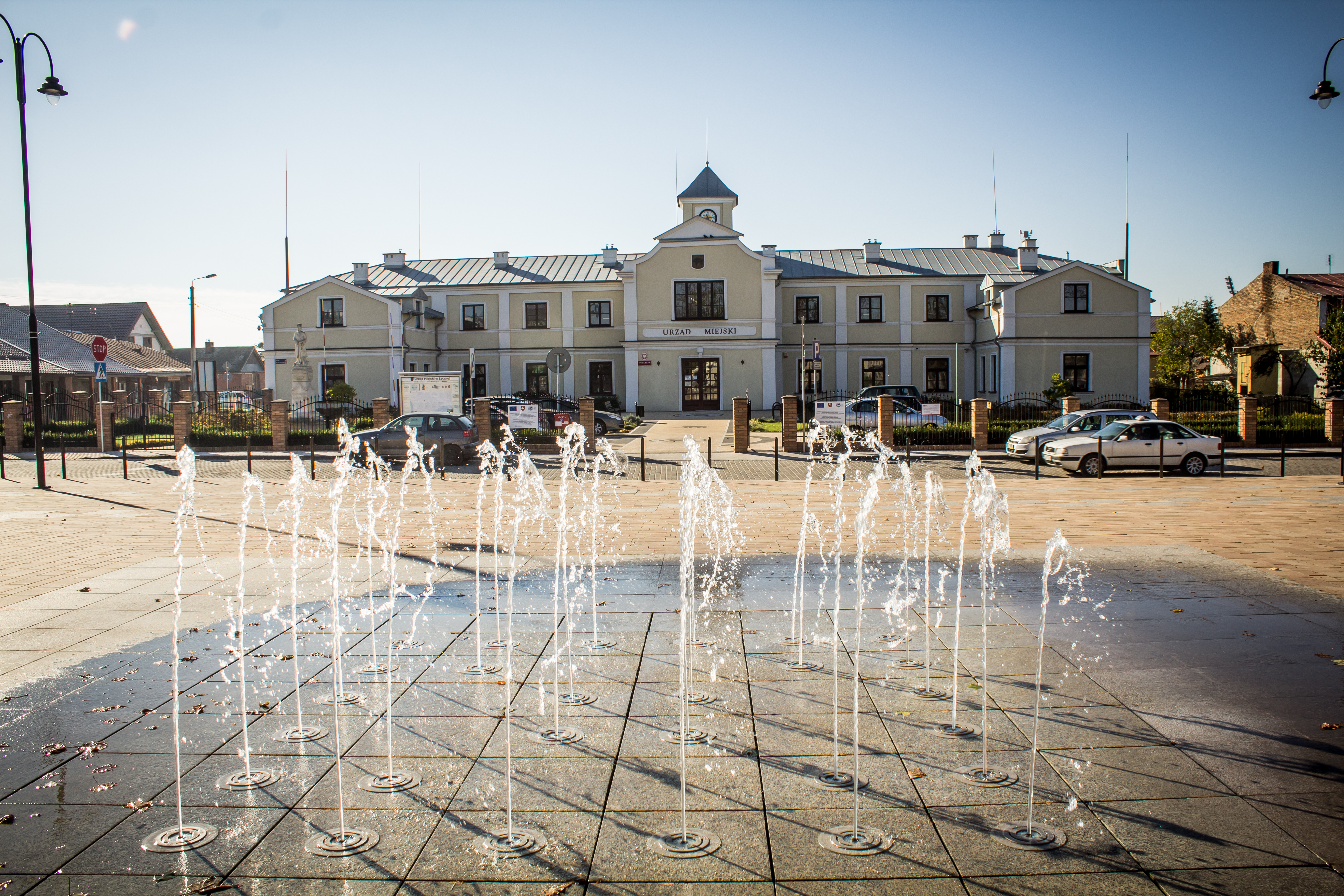 Ratusz i fontanna w Łęcznej